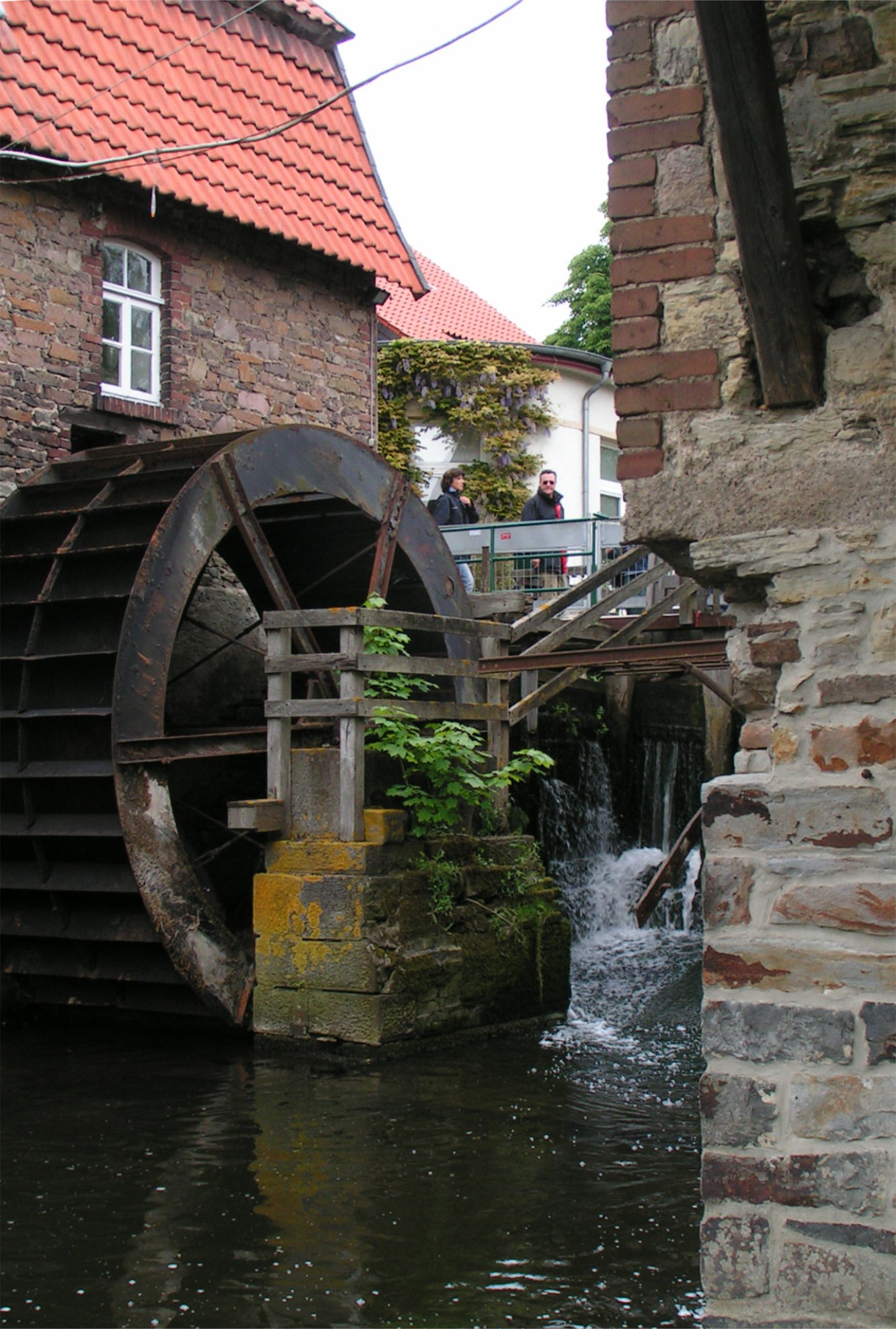 Nackte Mühle (Wassermühle) an der Nette